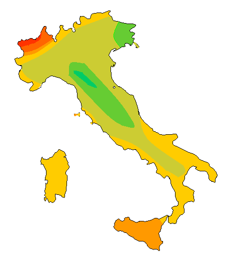 Carta della radiazione solare globale in Italia in aprile 24 MJ/mq